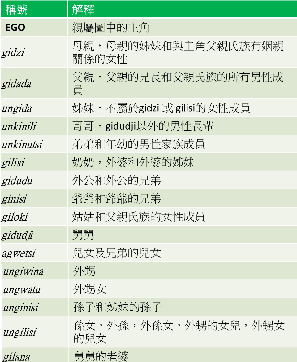 中文（台灣）: 切羅基人的親屬稱謂表